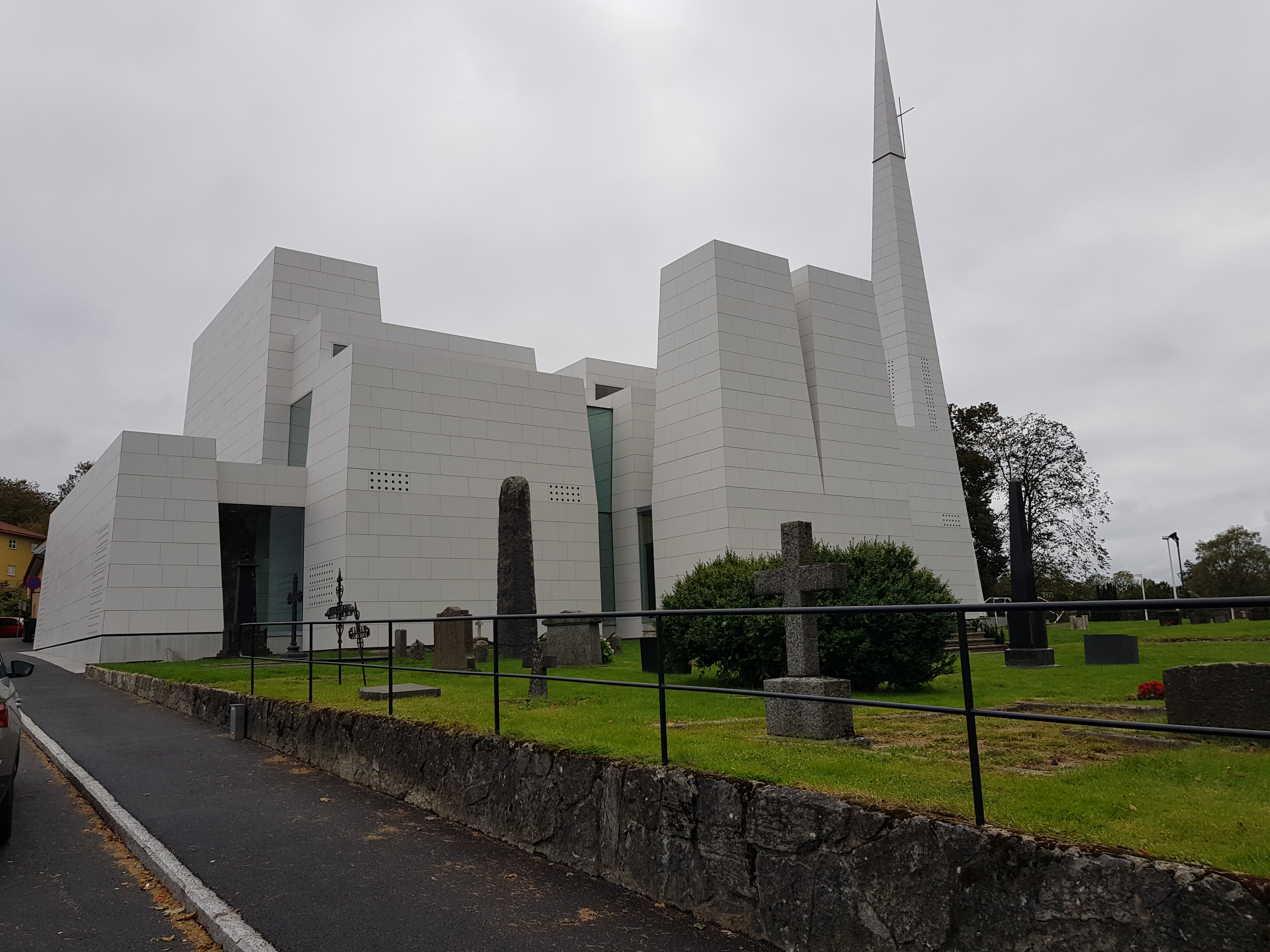 Nye Østre Porsgrunn kirke, innviet 2019. Arkitekt: Espen Surnevik og Trodahl arkitekter. Den gamle kirken brant i 2011.